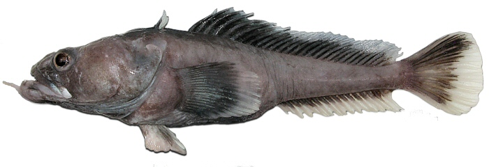 Immaculate plunderfish Pogonophryne immaculata Eakin, 1981, female, captured in 2010, Ross Sea, Antarctica